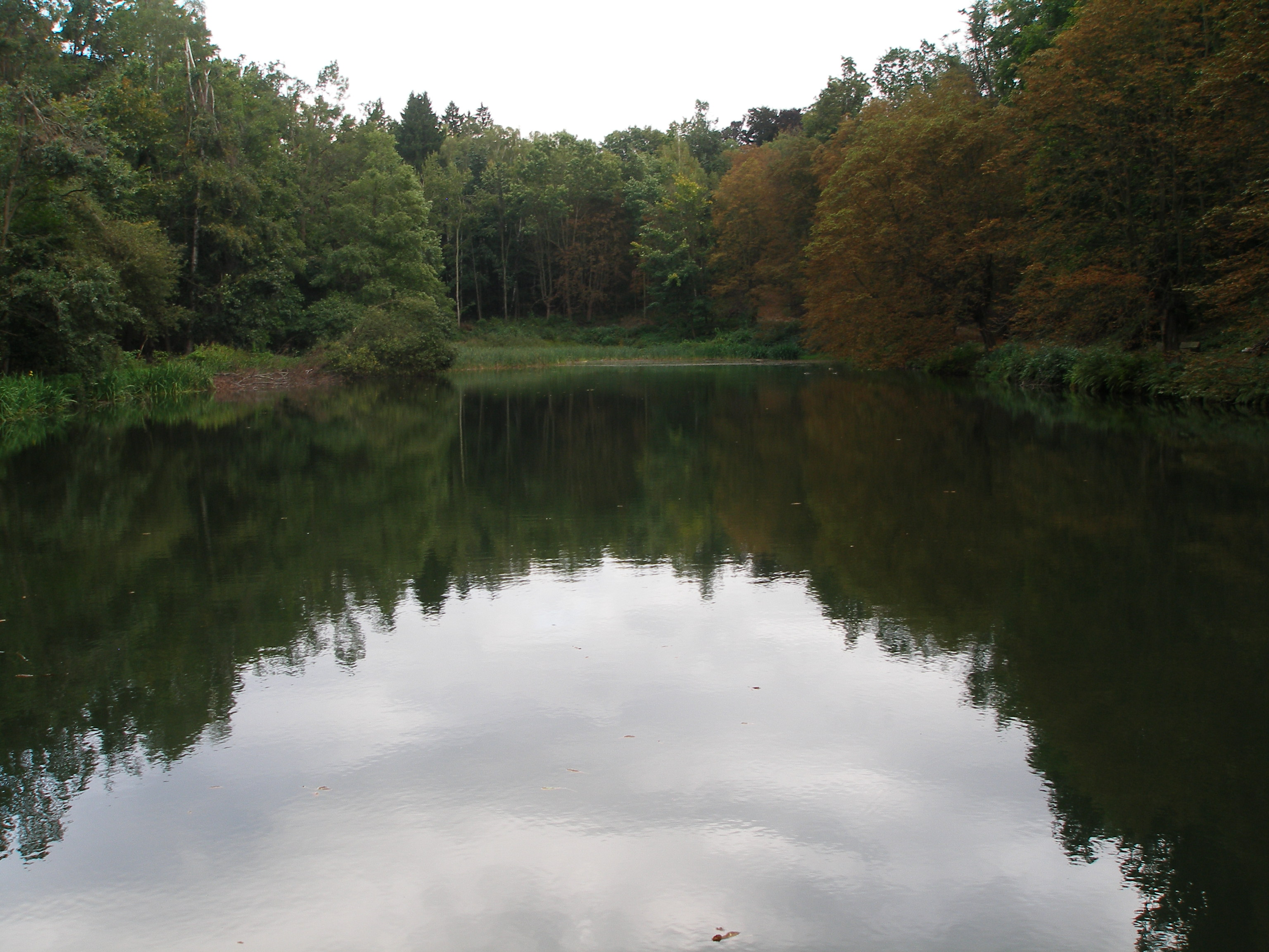 Lázeňský rybník na Libverdském potoce u obce Lázně Libverda.